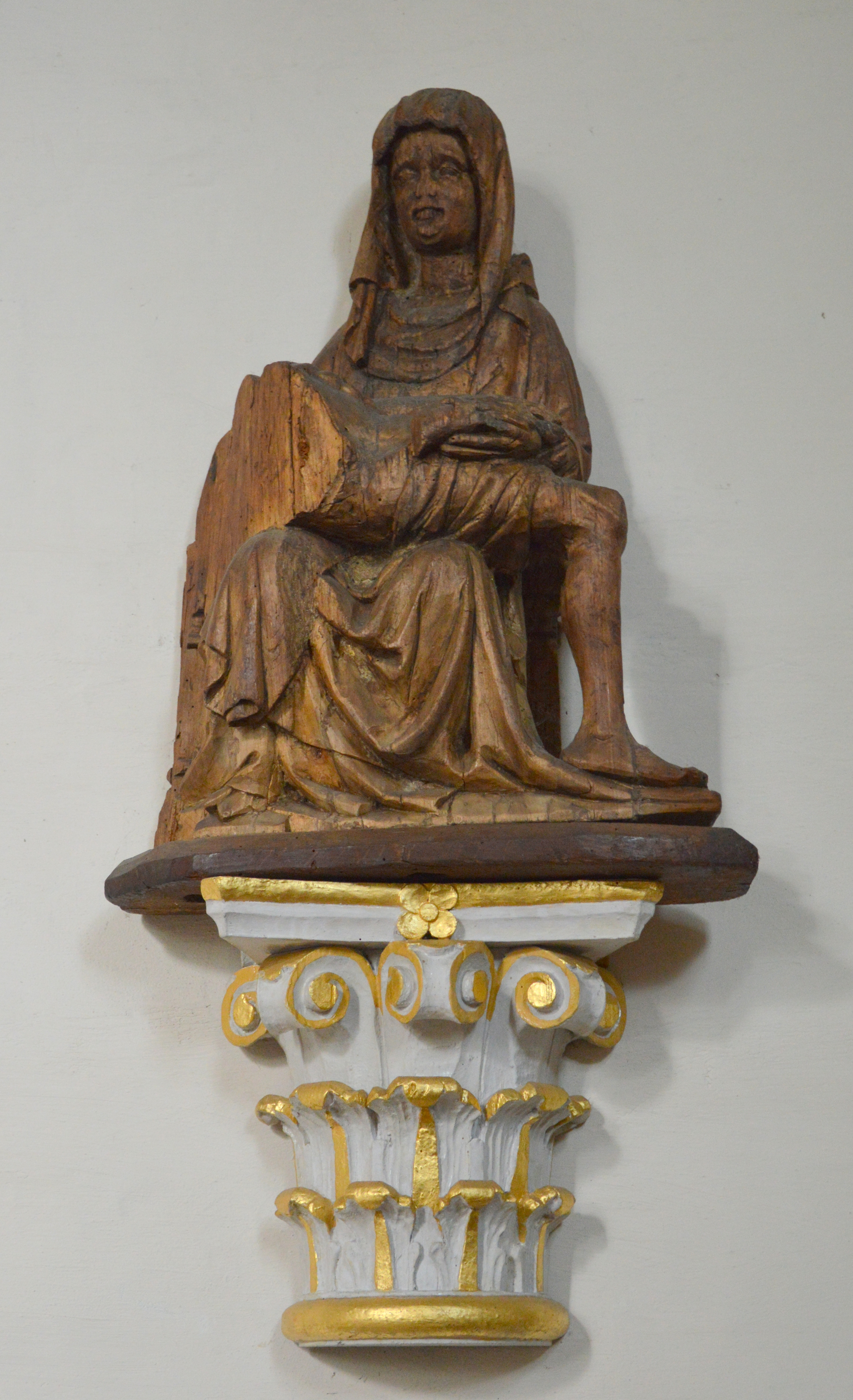 Kirche Plötzky Figur